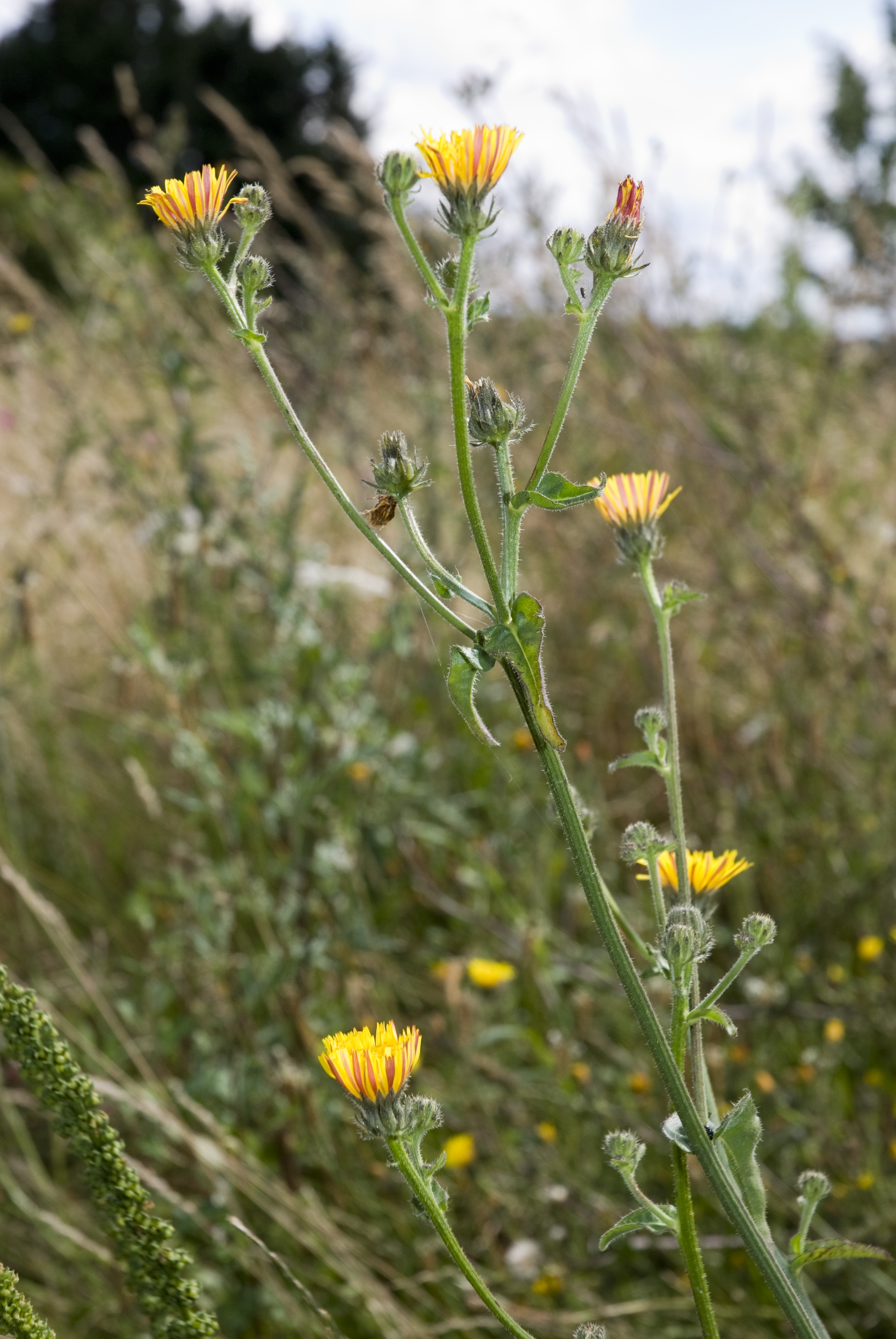 Picris hieracioides Vallée de Grâce à Amiens (Somme), France